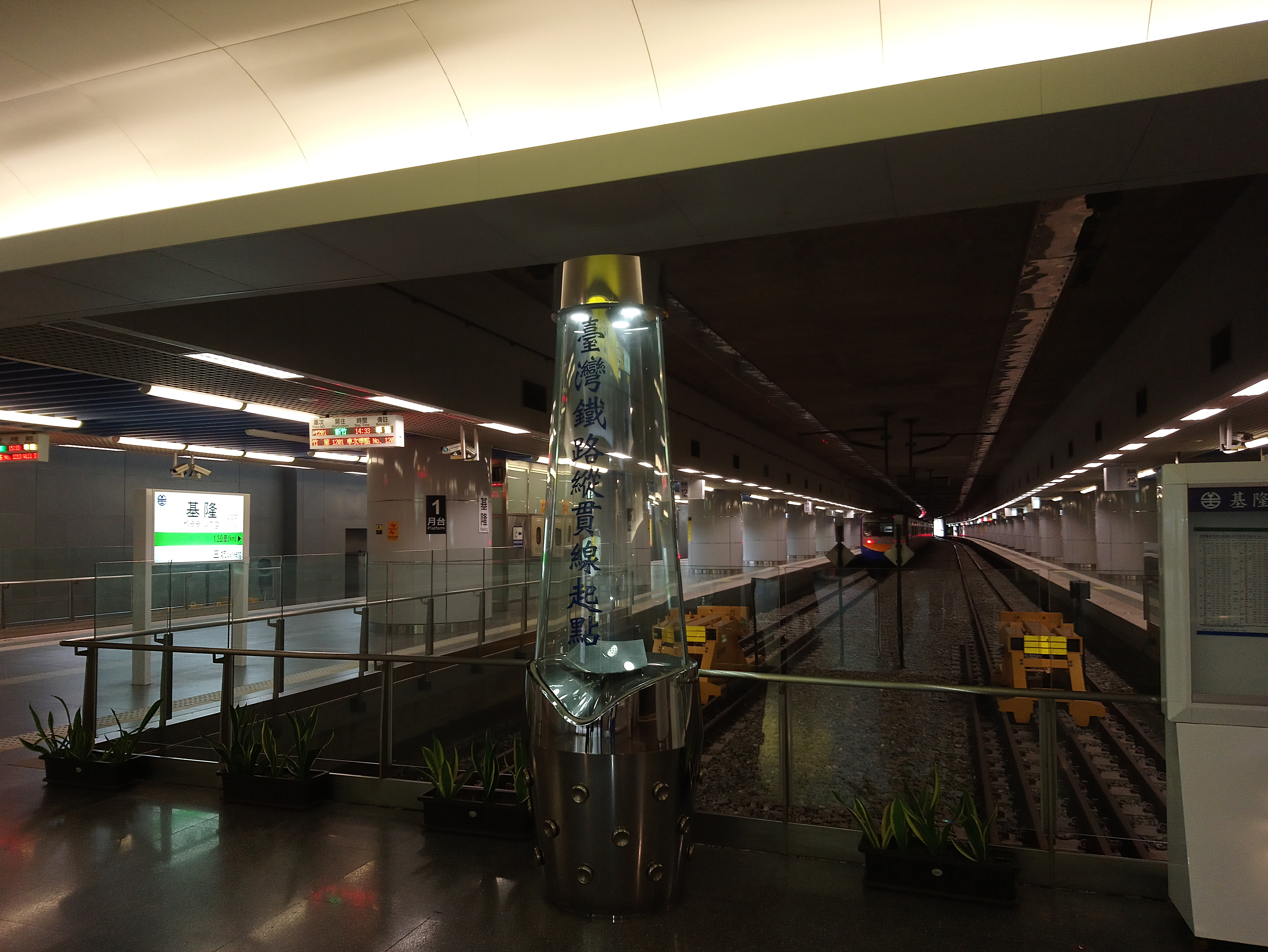 臺灣鐵路縱貫線起點,臺灣省基隆市仁愛區文昌里